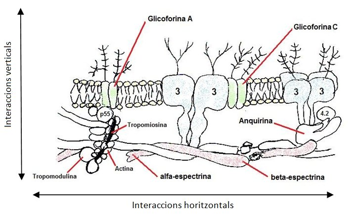 Dibuix d'una membrana d'eritròcit